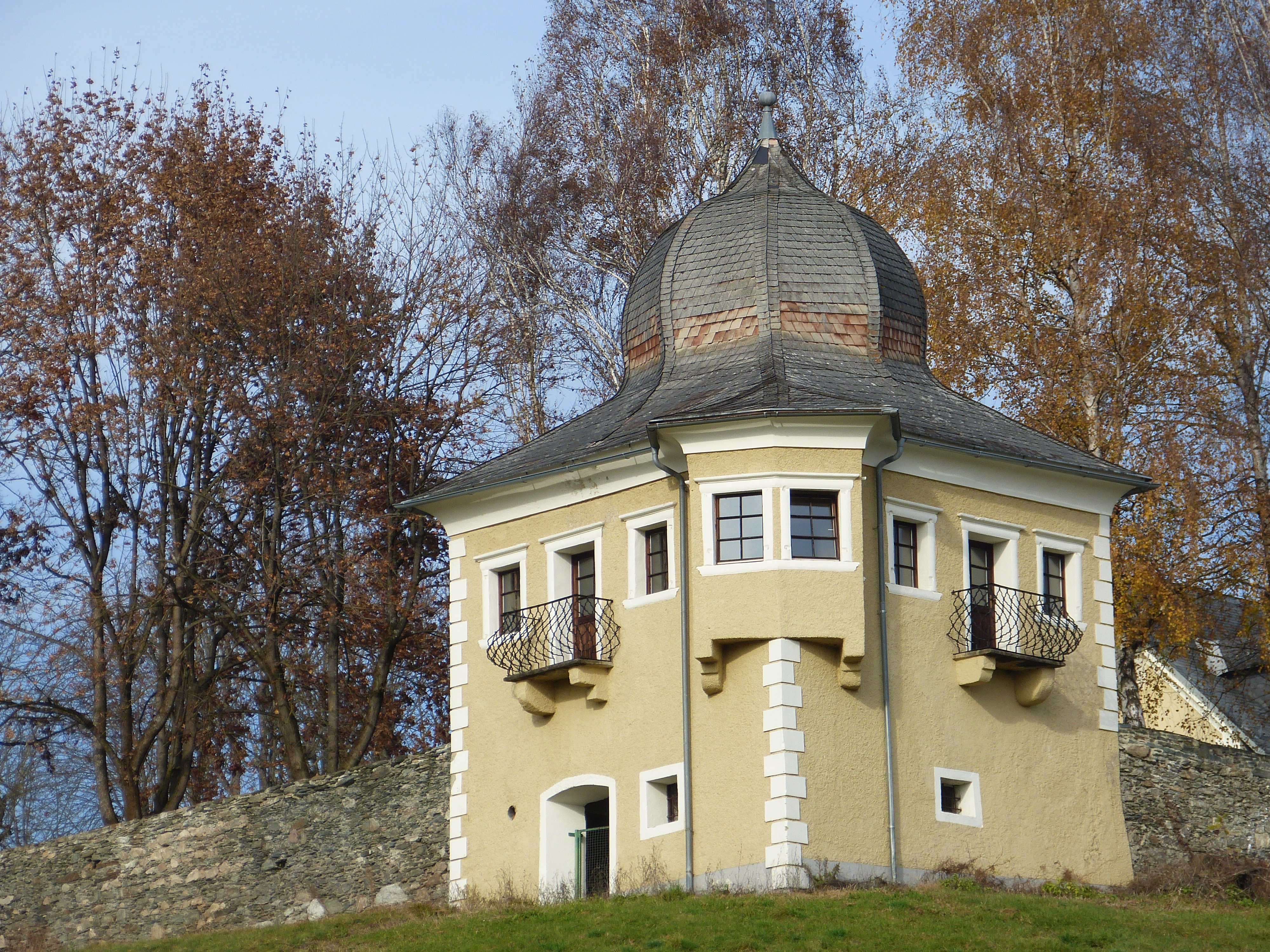 Schloss Hunnenbrunn: barock ausgebauter Eckpavillon im Süden (Ansicht von Süden)